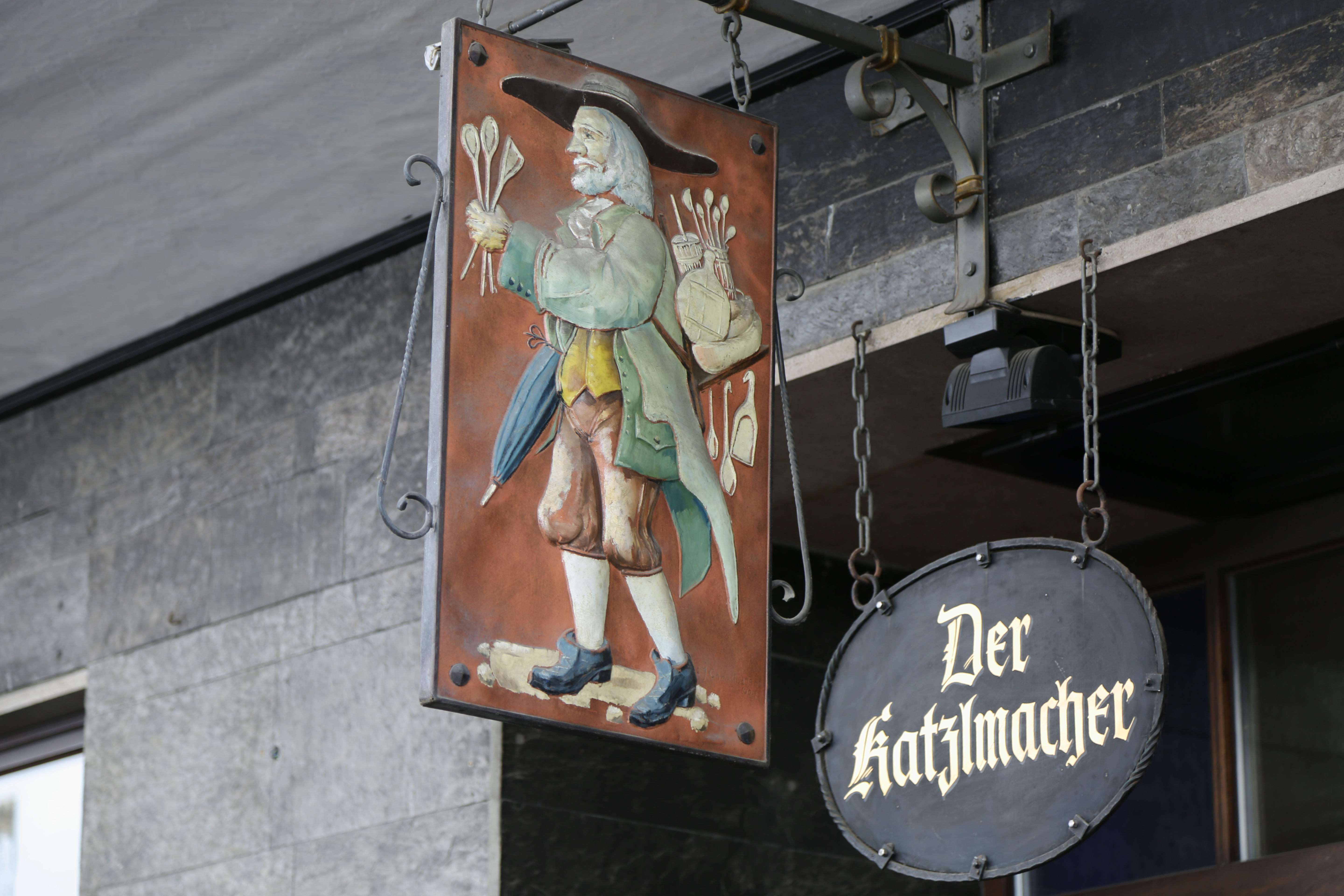 Wirtshausschild "Der Katzlmacher" in München, Bräuhausstraße